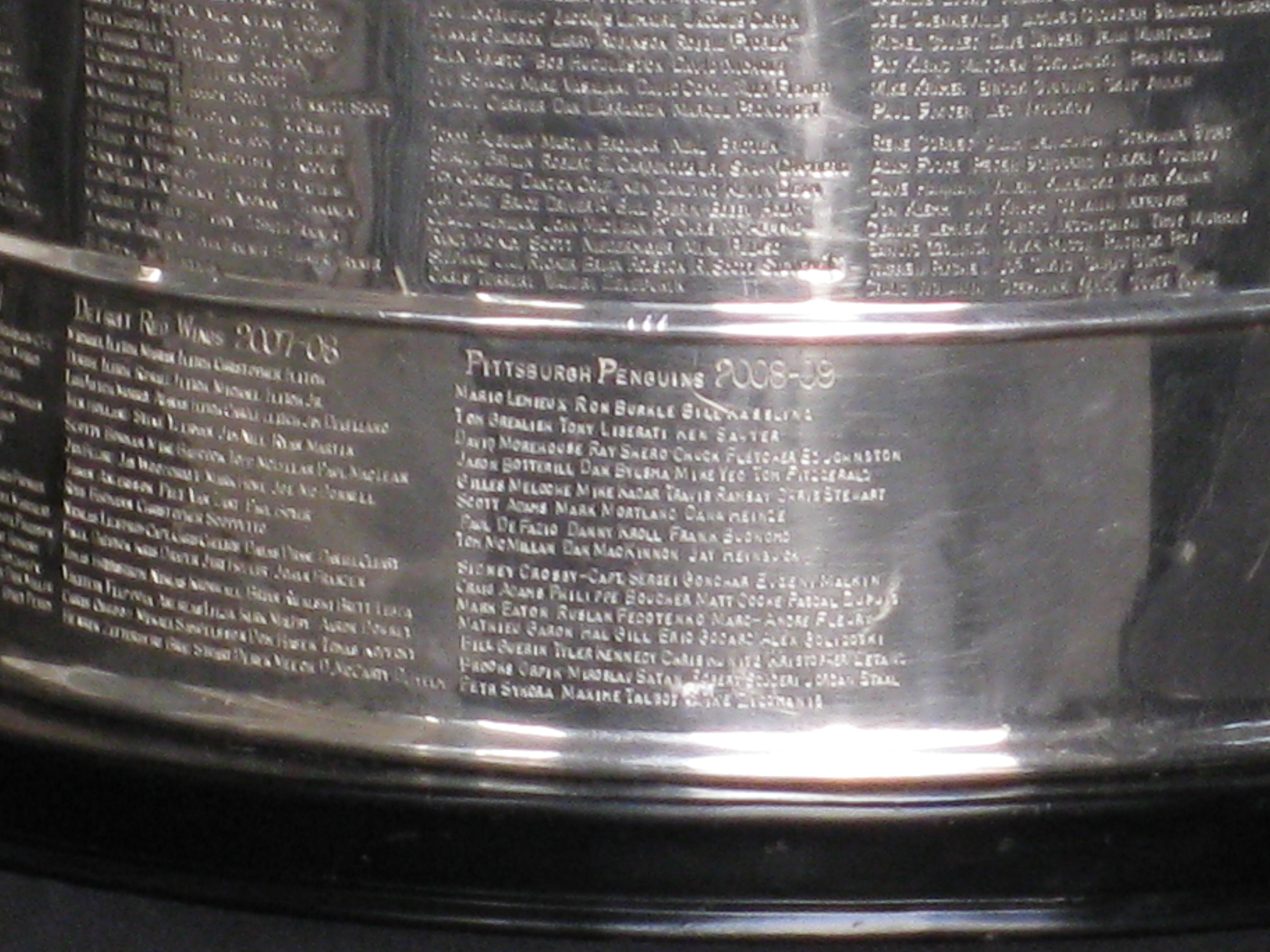 20x zoom photo = 5x optical zoom + 15x digital zoom.